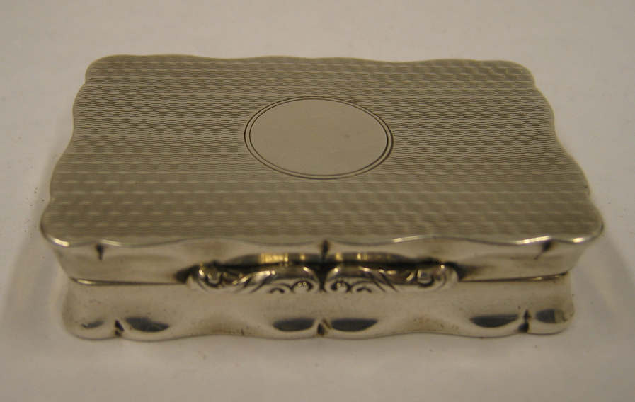 Schnupftabaksdose, Sterlingsilber, Birmingham 1894, Größe 6×4 cm.